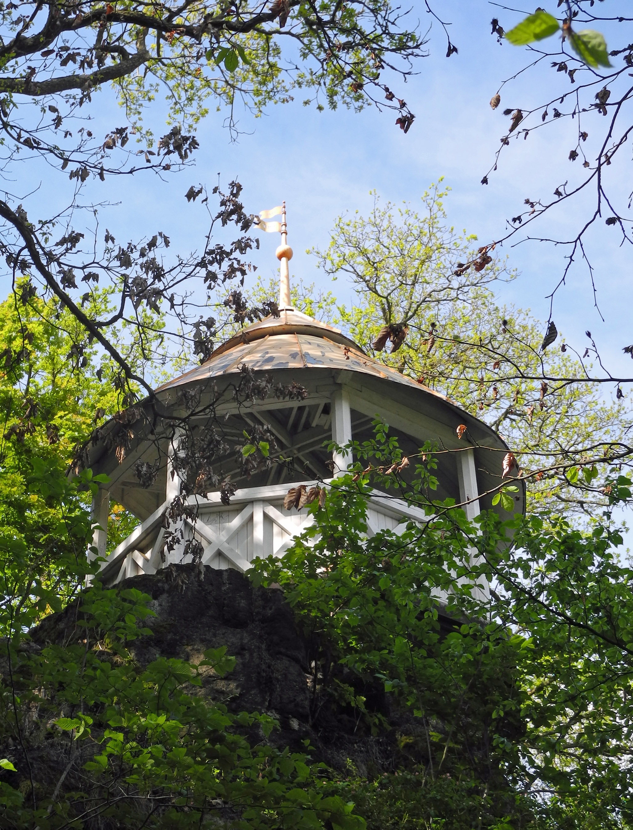 Pavillon Kristýna im Stadtwald von Karlsbad (Karlovy Vary)